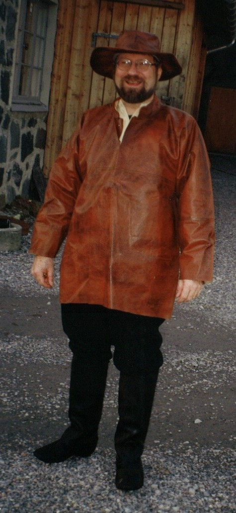 sydd etter modell av ein eldre ved Sunnmøre Museum